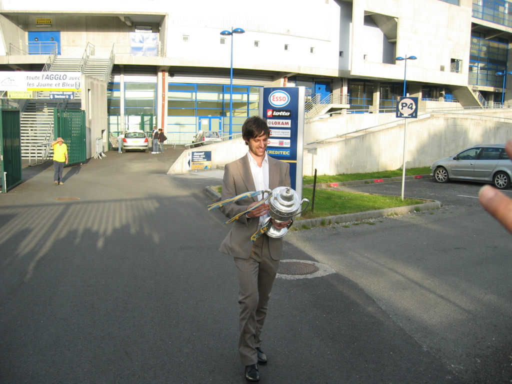 Jérémie Bréchet, capitaine du FC Sochaux, vainqueur de la Coupe de France 2007, jour du retour du FC Sochaux du Stade de France à Sochaux